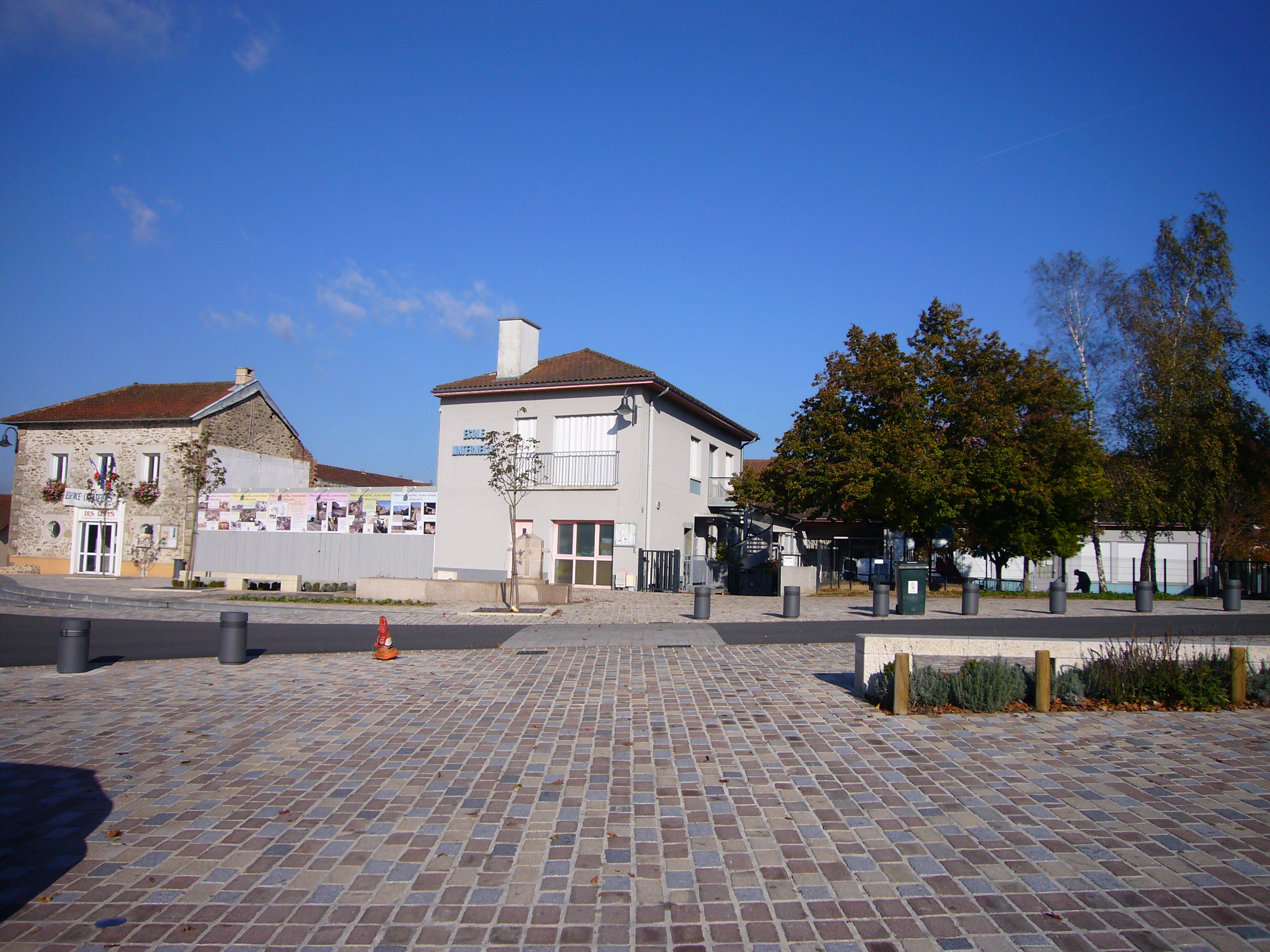 L'école maternelle P. Kergomard de Panazol et la place de la République (Panazol, 87, France)